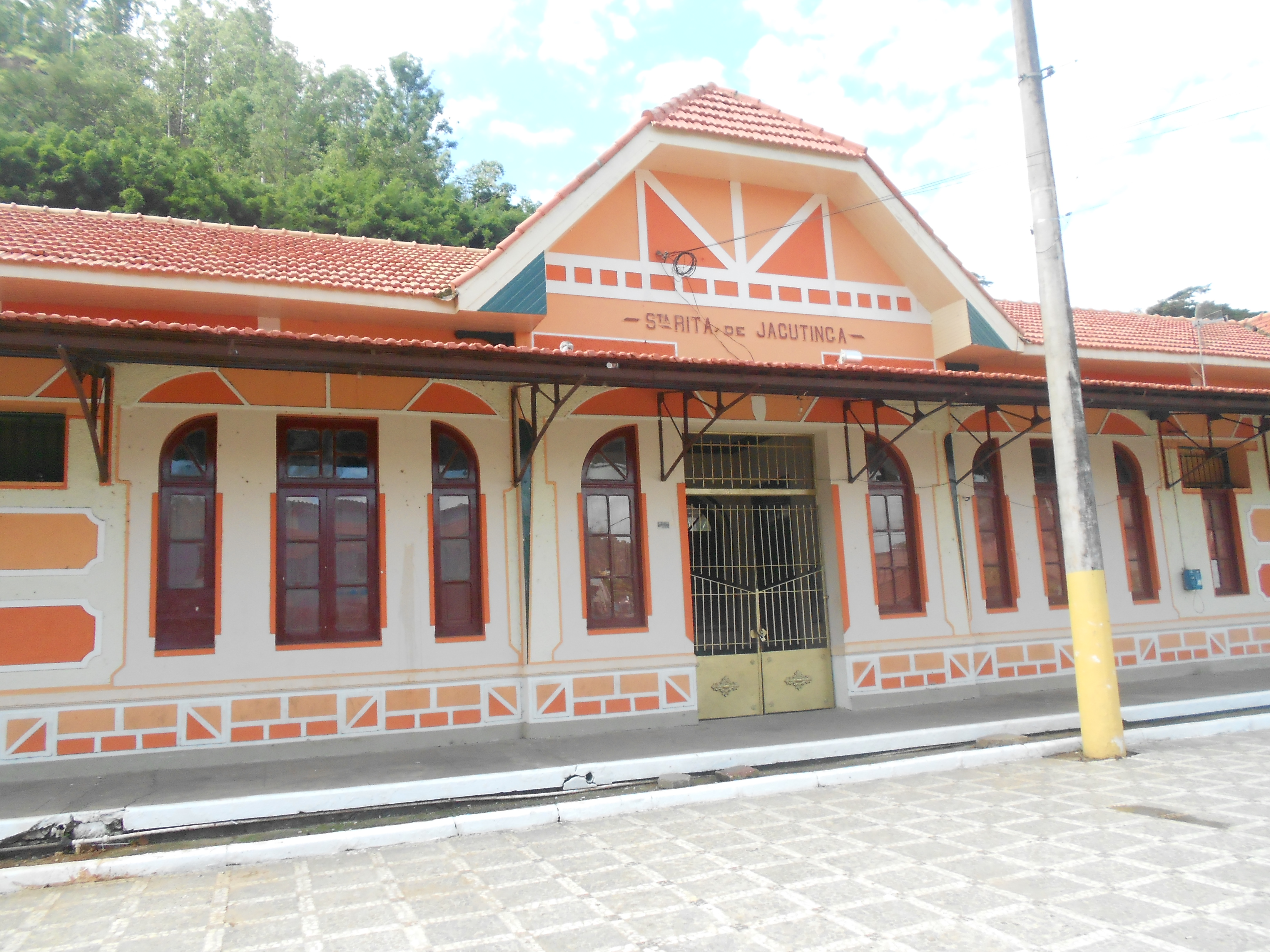 Secretaria de Turismo de Santa Rita de Jacutinga, situado na Praça Governador Valadares, Minas Gerais, Brasil.